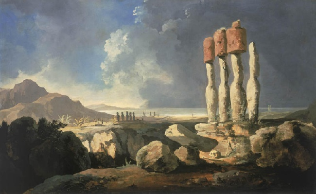 Moais auf der Osterinsel, Bild von William Hodges